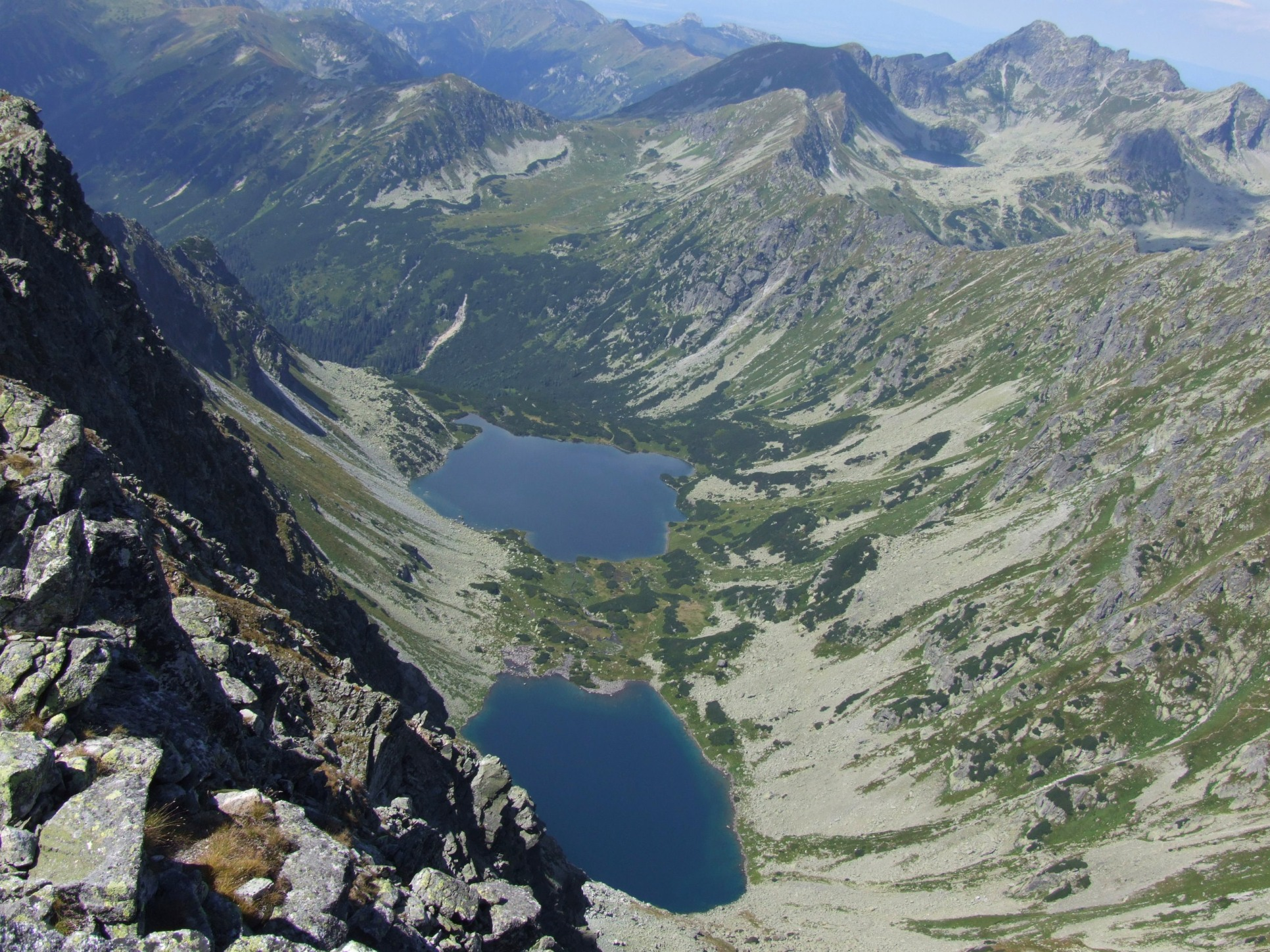 Dolina Ciemnosmreczyńska. Widok z Koprowego Szczytu